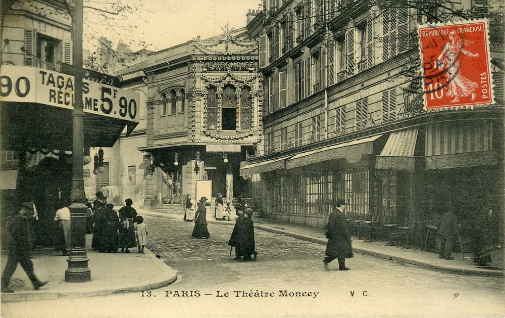 V.C. n° 113 : Paris - Le Théâtre Moncey Carte postale ancienne; photographie prise de l'avenue de Clichy (le no 50, visible à droite, subsiste en 2018) vers la rue Pierre-Ginier, avec le Théâtre Moncey à l'arrière-plan.